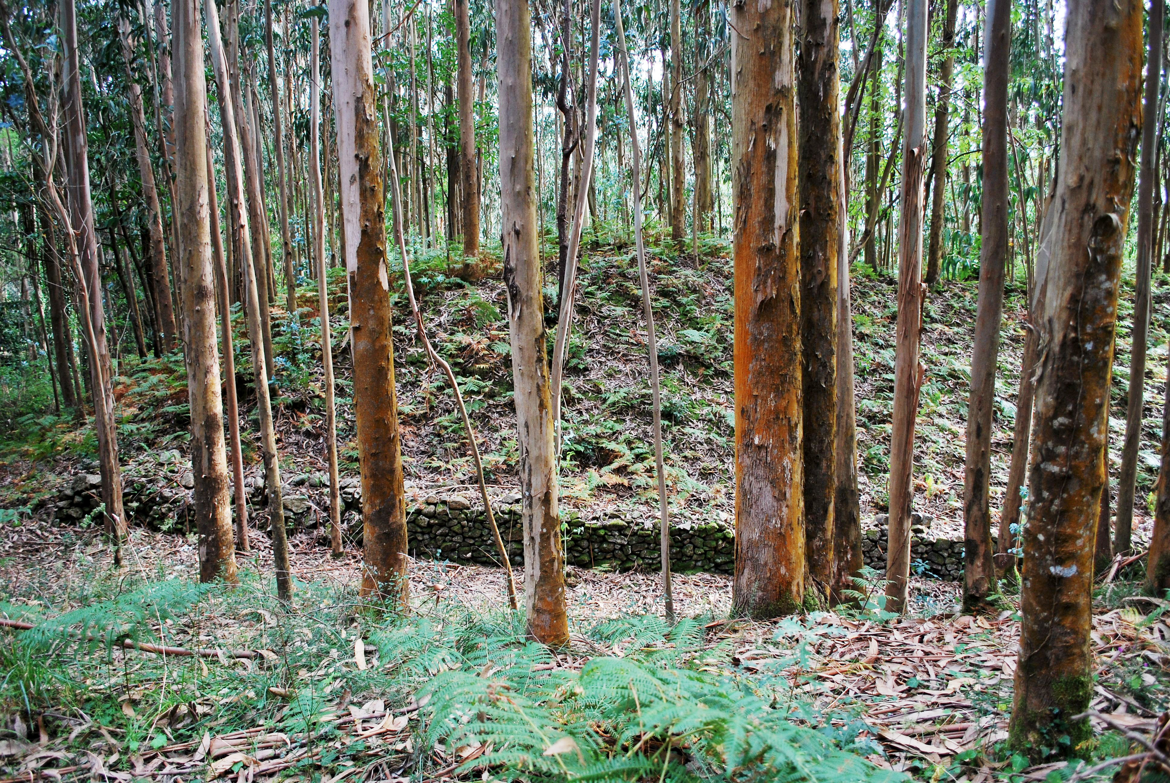 Muro norte do castro de Papoi, Ferrol A Coruña Galiza Spain